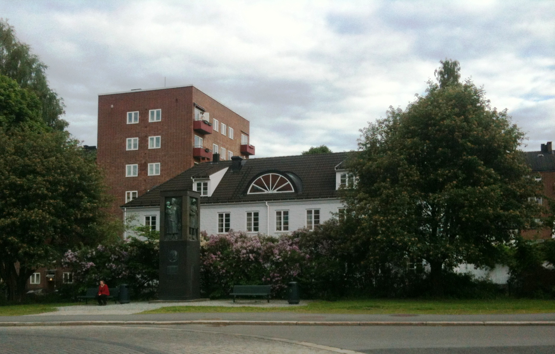 Advokat Dehlis plass, Bjølsen. Lokalt vernet bygning på Sagene i Oslo. Maridalsveien 161, bildet viser produksjonslokale tegnet av Ekman, Smith & Michalsen. I forgrunnen skulptur over adv.Dehli.